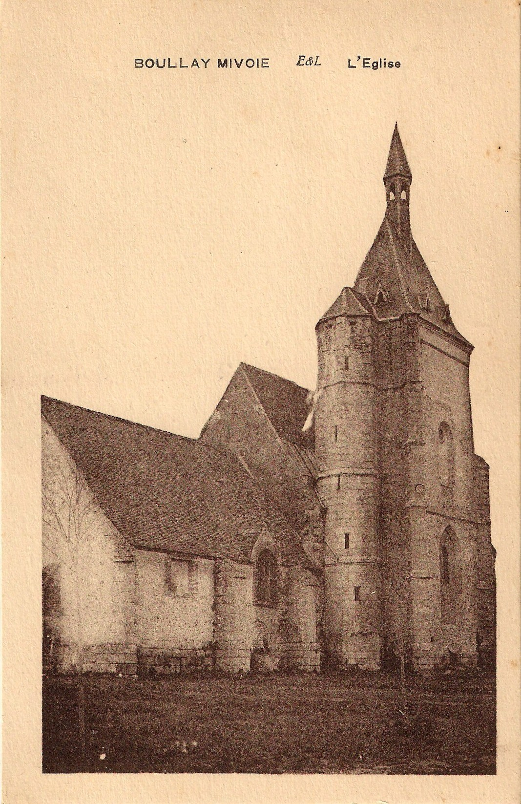 "L'église", Le Boullay-Mivoye, Eure-et-Loir (France).